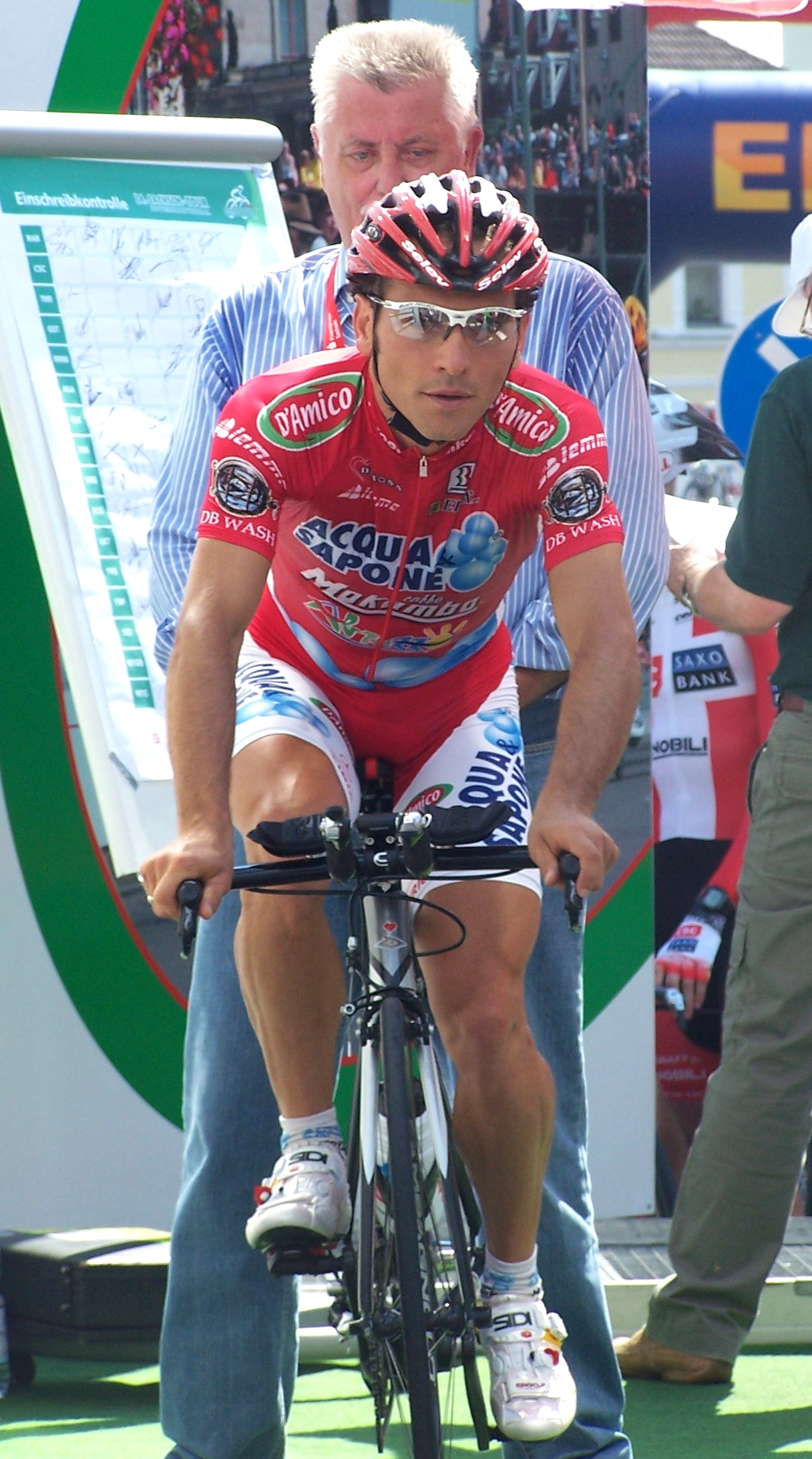 Massimiliano Gentili 2 - Sachsentour (Die Aufnahme entstand beim Einzelzeitfahren der Sachsen-Tour 2008 in Großenhain)